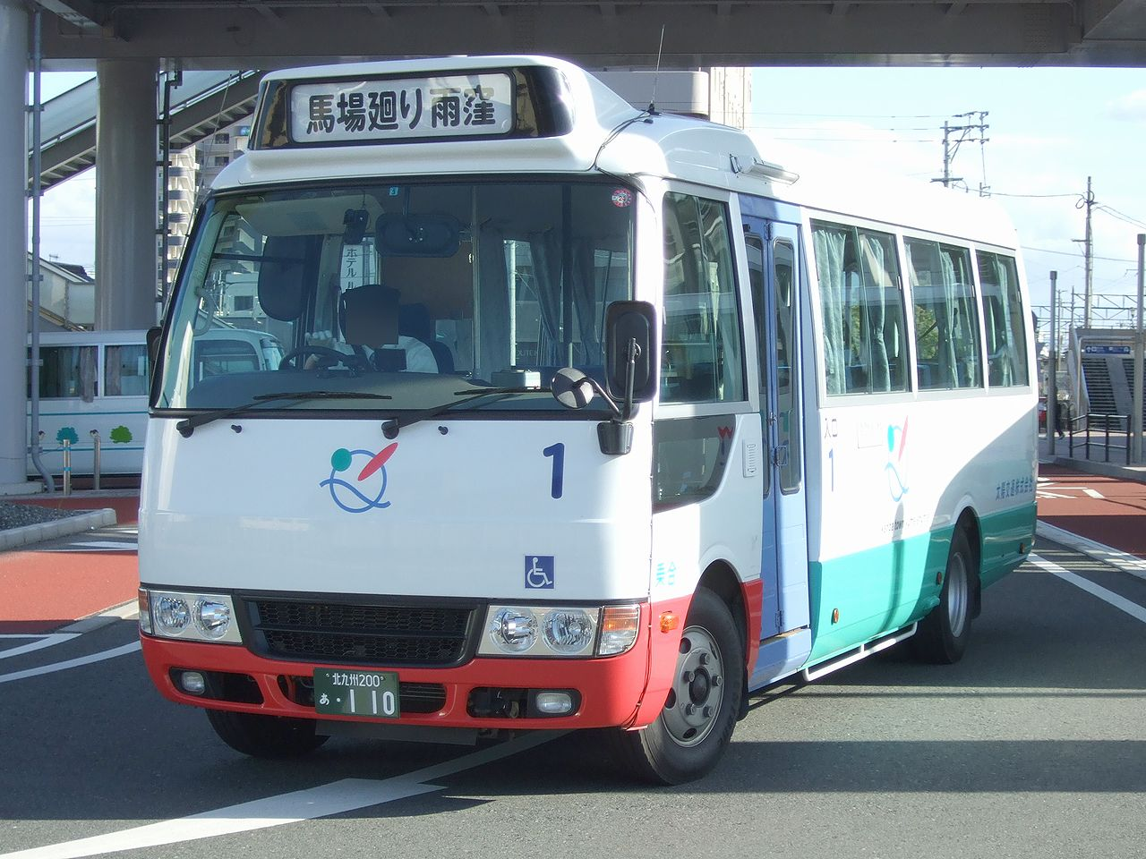 "Yume Shuttle", Kanda Town community bus. 苅田町コミュニティバス「ゆめシャトル」1号